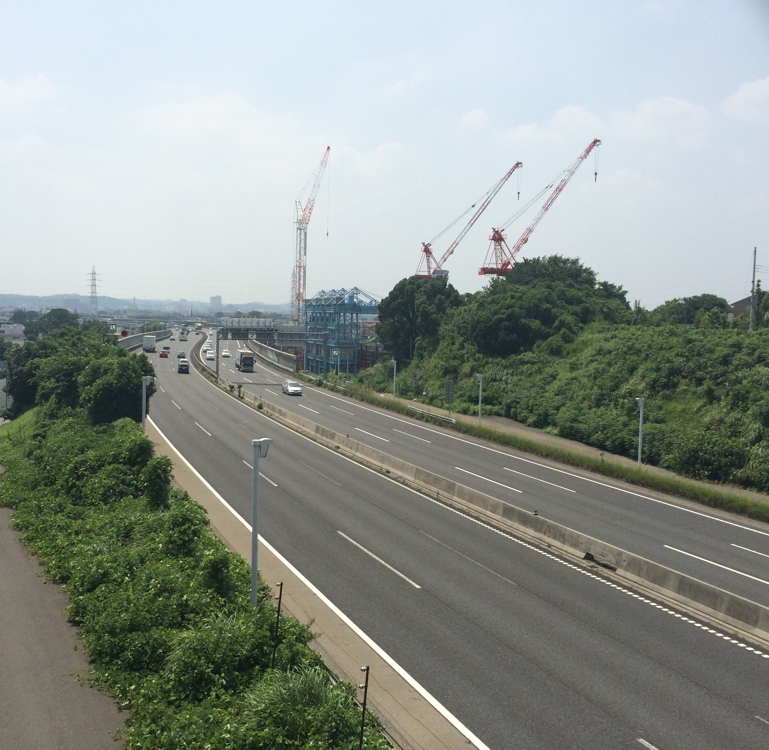 東名ジャンクション（仮称）予定地（2014年7月撮影）